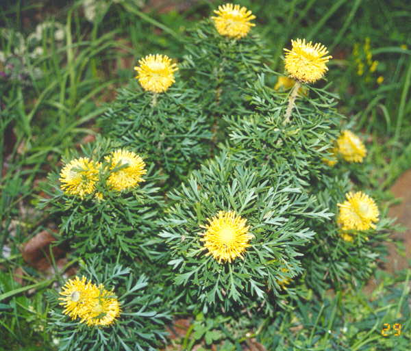 Isopogon anemonifolius - Woorikee 2000 - photo taken in my garden in Sydney